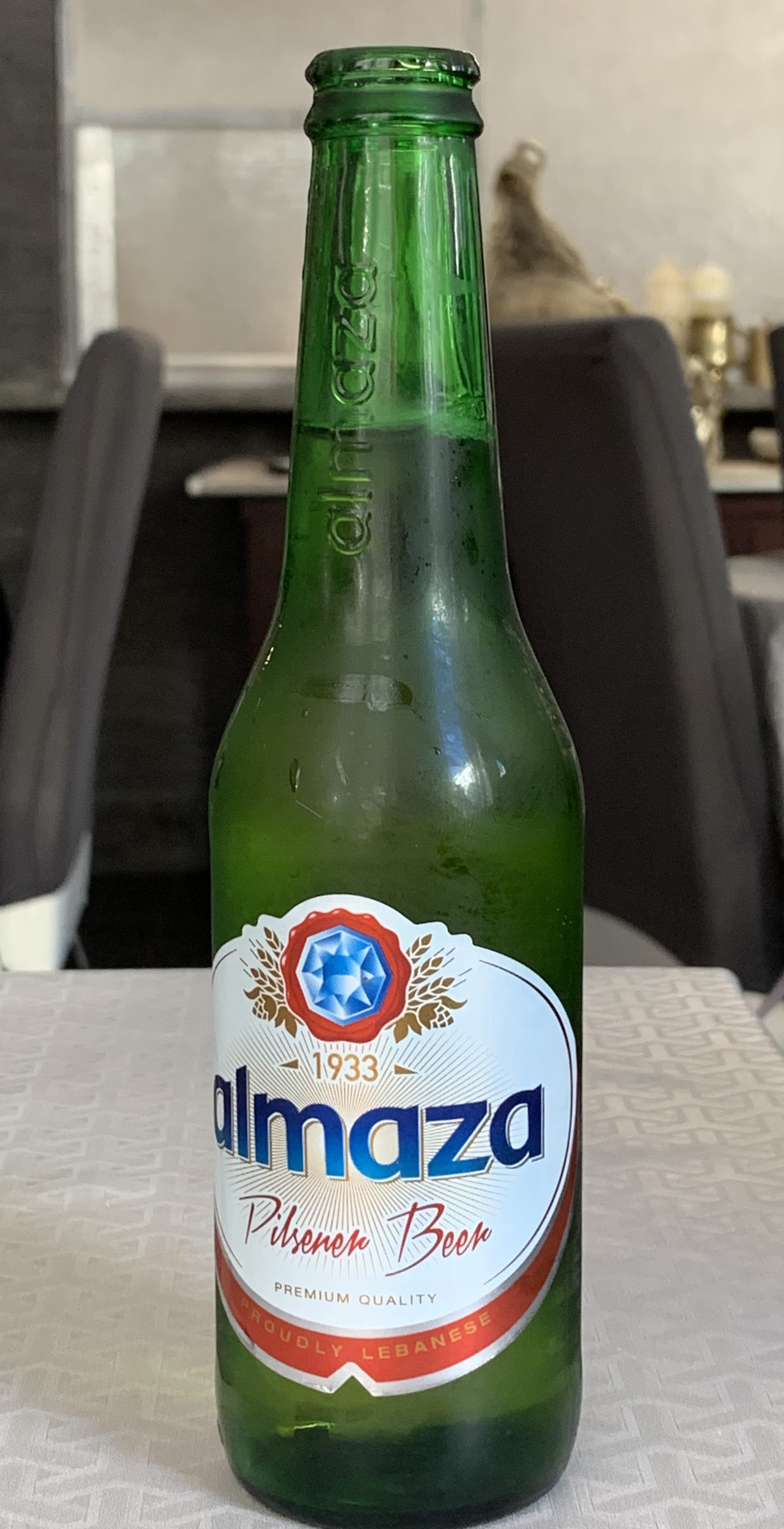 Restaurant Rose de Damas (Lyon).